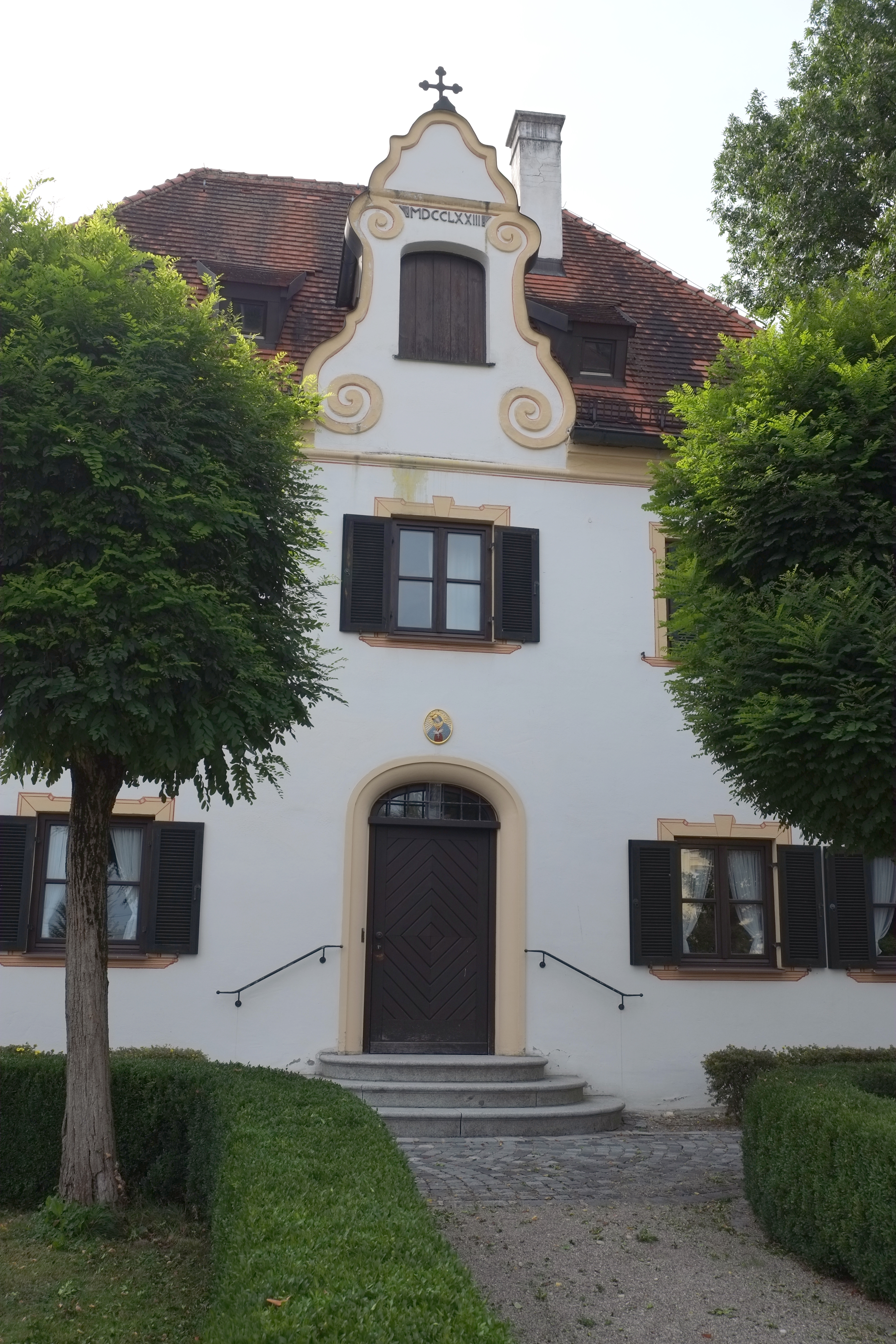 Pfarrhaus in Augsburg-Bergheim (Bayern, Deutschland)